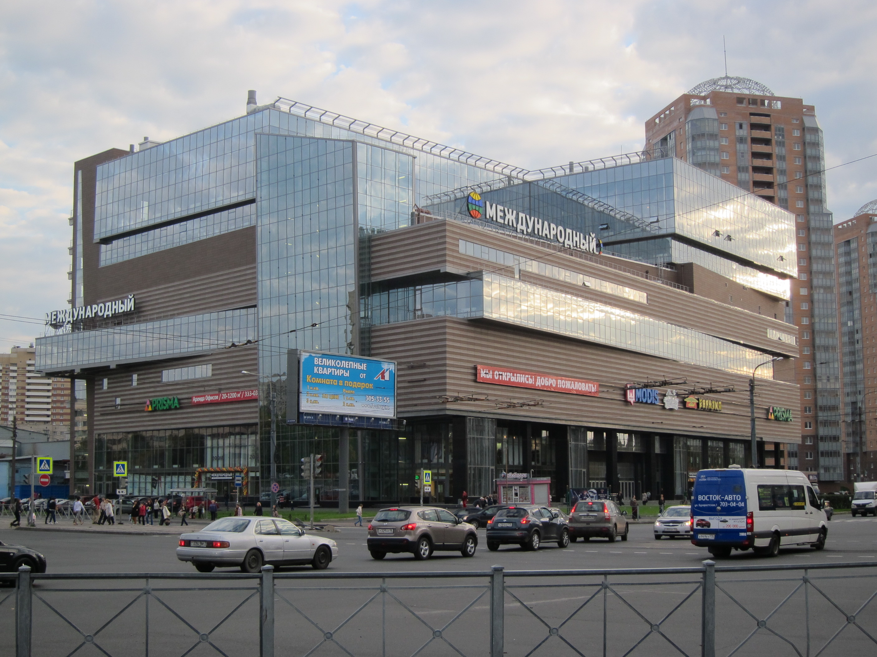 ТРК «Международный», в котором располагается вестибюль станции метро «Международная»